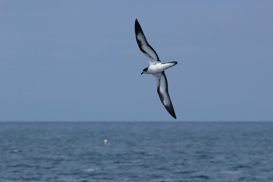 Un pétrel des Galapagos (Pterodroma phaeopygia) en vol au large de San Cristobal